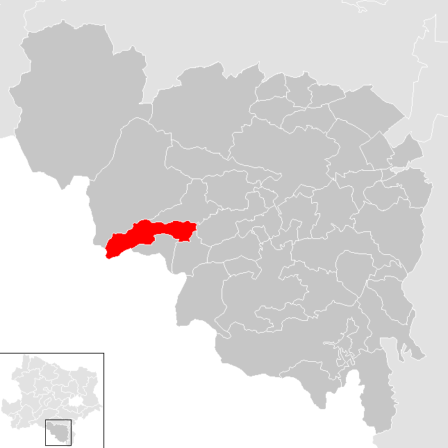 Bezirk Neunkirchen